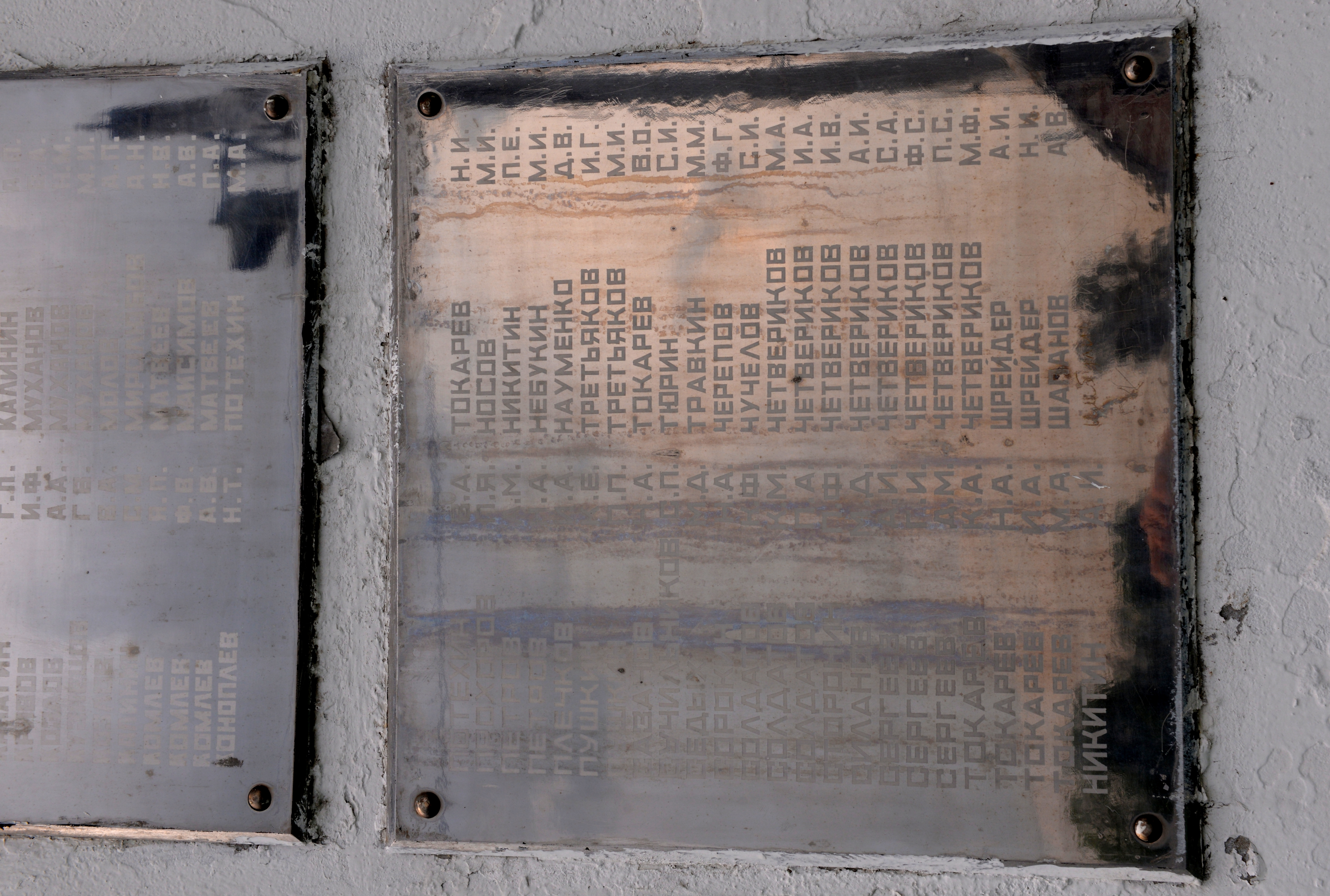 Одна из табличек на обелиске с фамилиями погибших в годы ВОВ жителей Мячковского сельского совета. Мячково, Володарский район Нижегородской области.